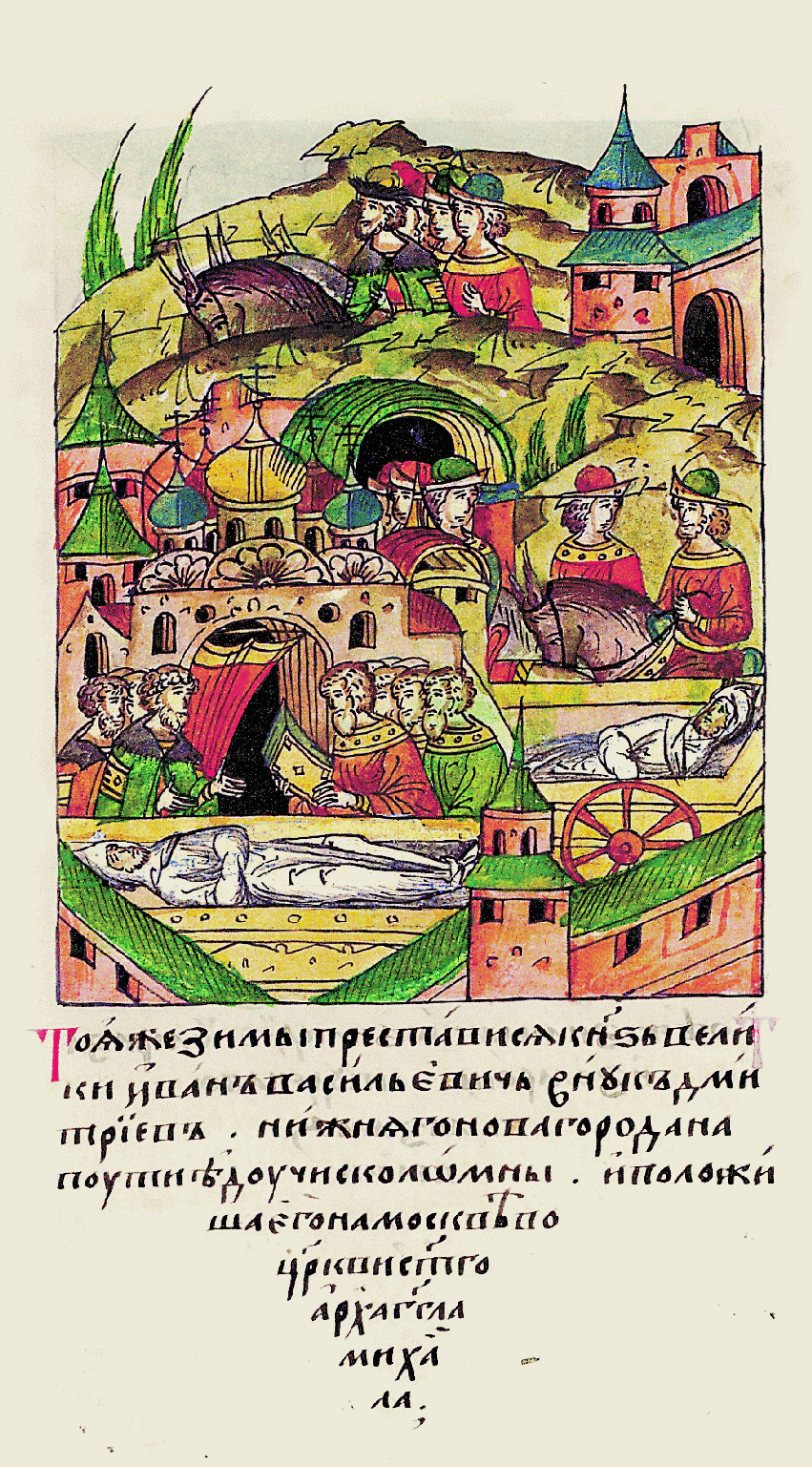 В ту же зиму преставился великий князь Нижнего Новгорода Иван Васильевич, внук Дмитриев, возвраща- ясь из Коломны. И по- хоронили его в Мо- скве в церкви святого архангела Михаила.